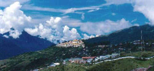 Das Städtchen Tawang im gleichnamigen nordindischen Distrikt